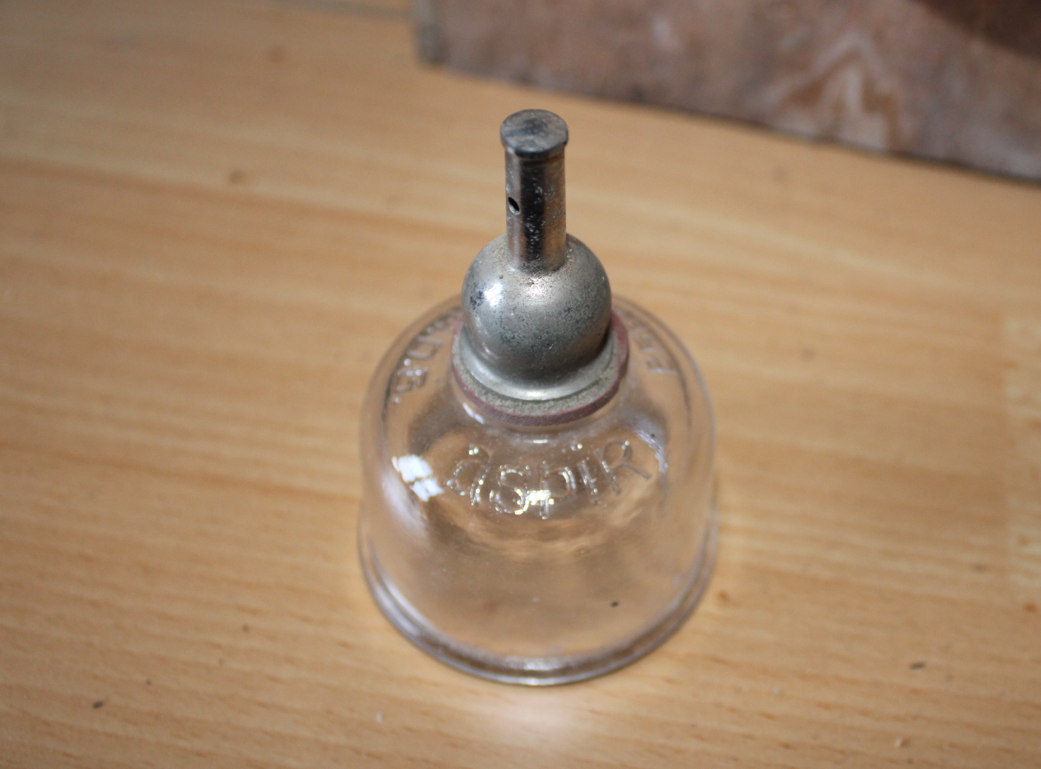 Ventouse médicale de la marque "Apir Breveté SGDG" (vers 1930)